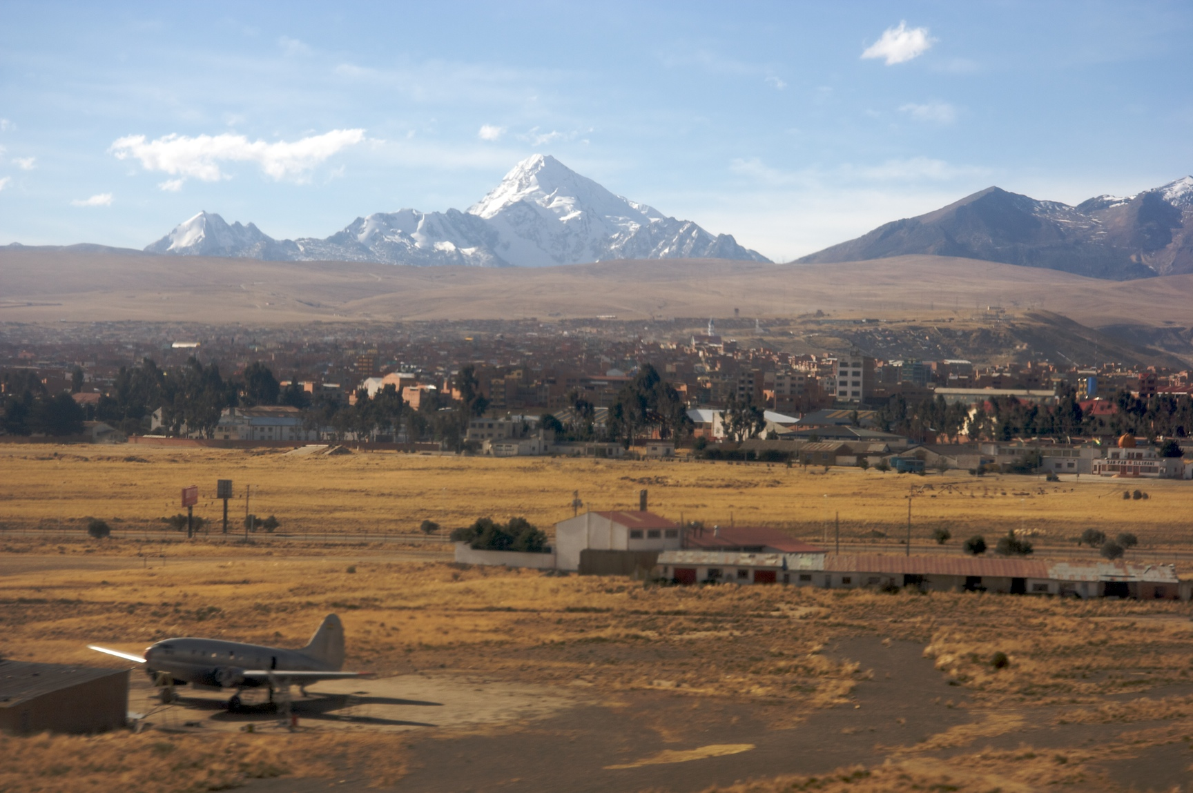 vista de la ciudad del Alto colindante a la ciudad de La Paz, Bolivia.